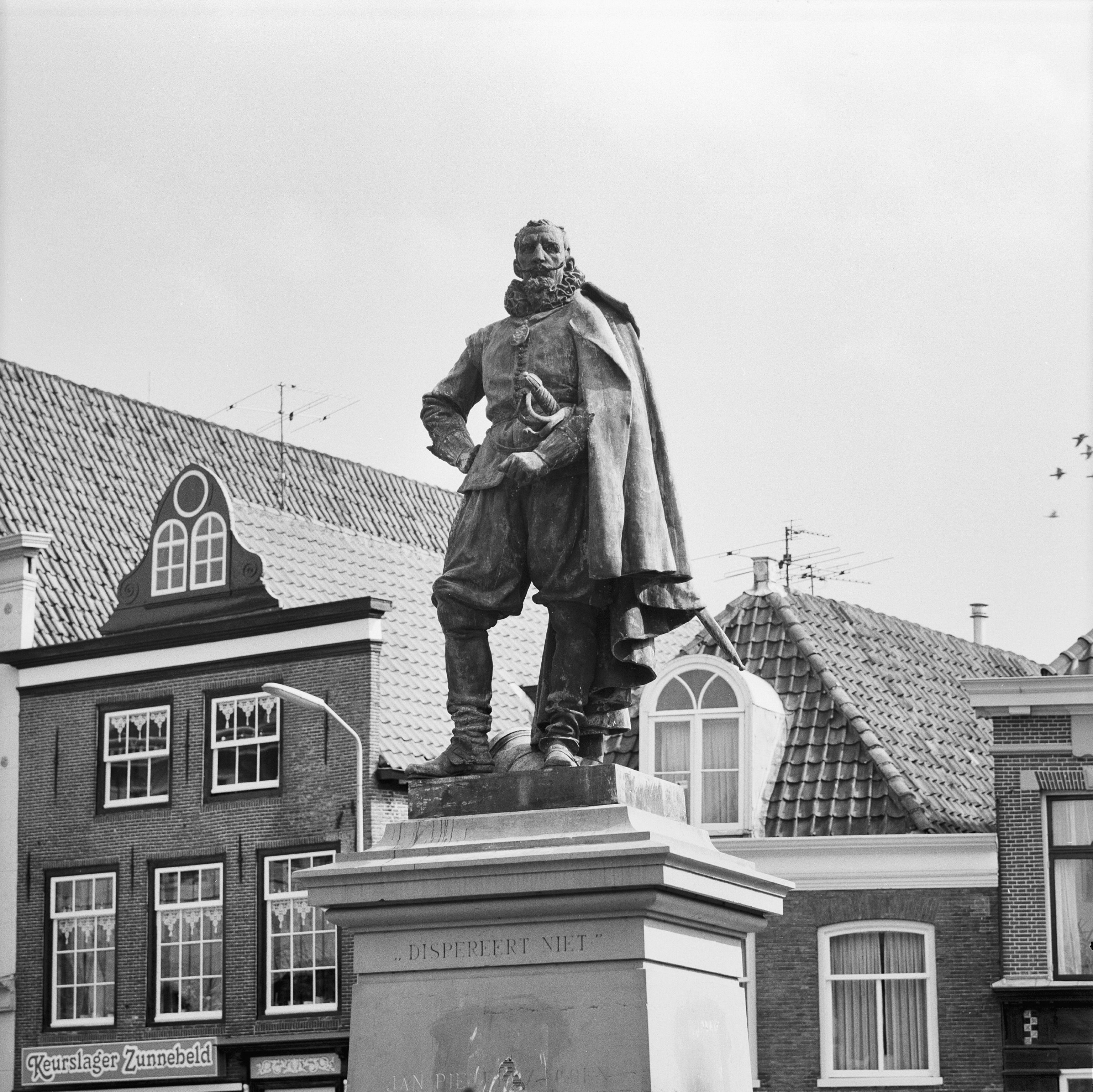 STANDBEELD J.P.ZN COEN: Exterieur STANDBEELD OP DE RODE STEEN